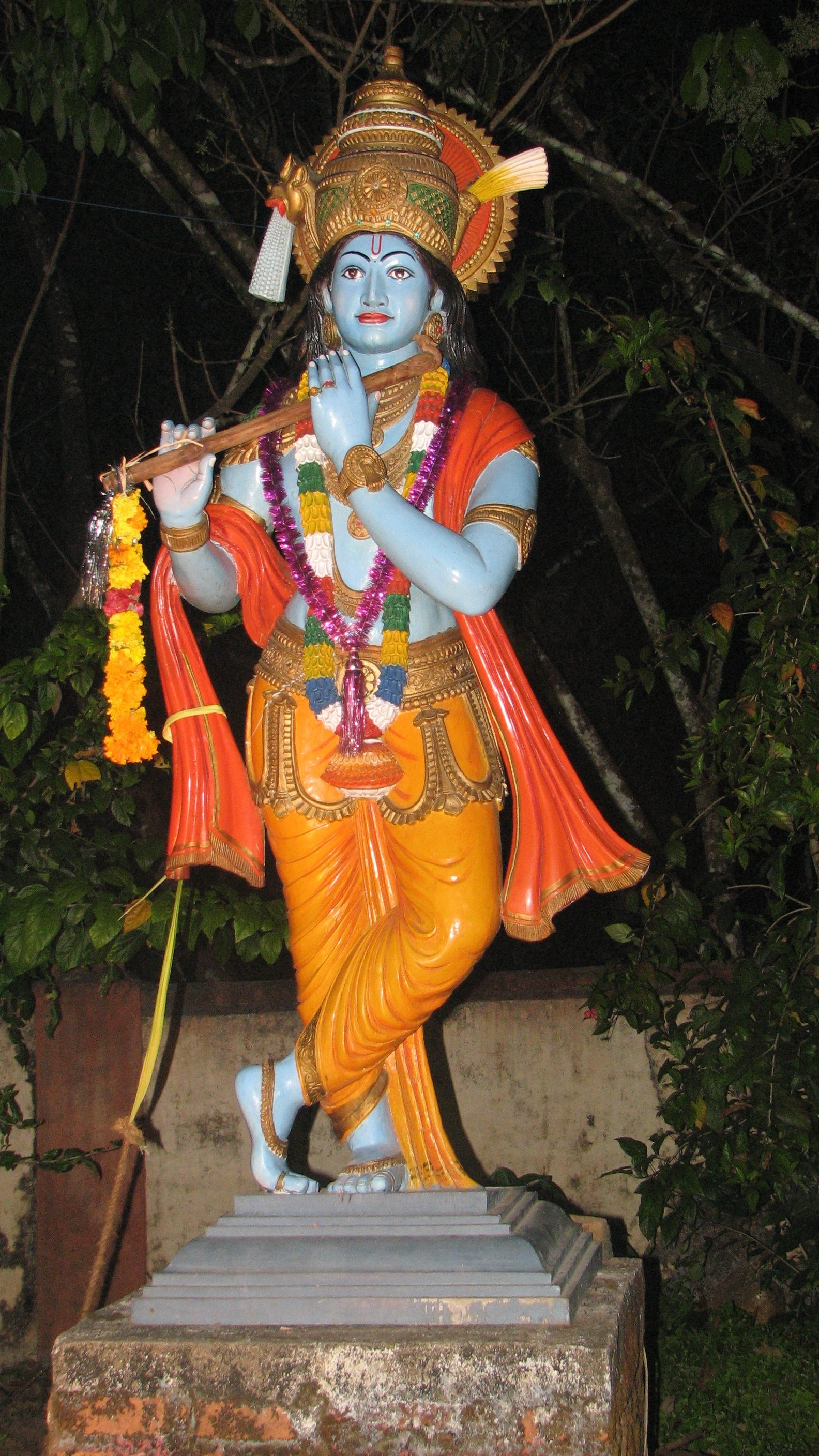 കോട്ടാങ്ങൽ പടയണിയ്ക്കു അലങ്കാരമായി വെച്ചിരിക്കുന്ന കൃഷ്ണന്റെ പ്രതിമ.